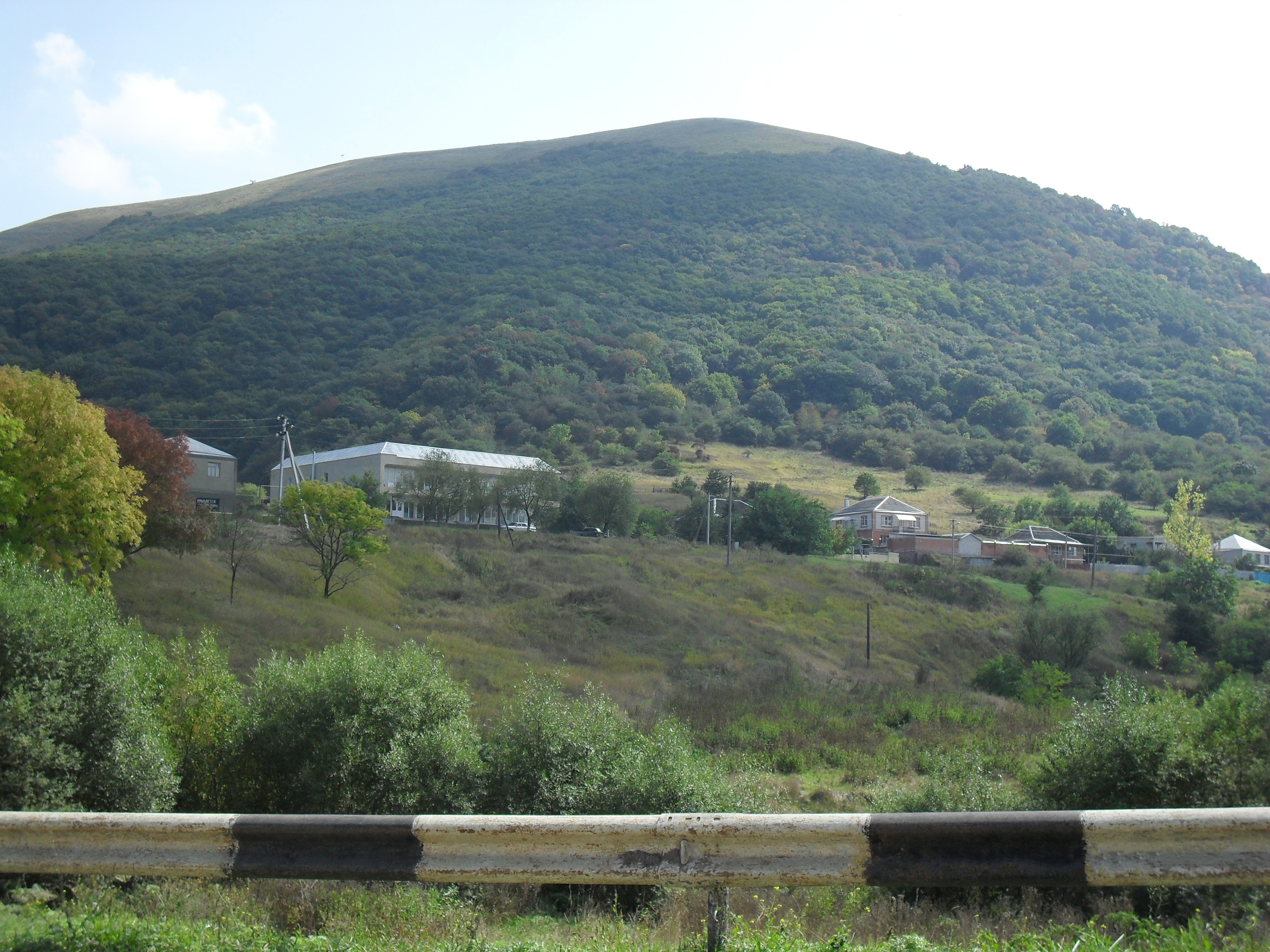 Гора Юца